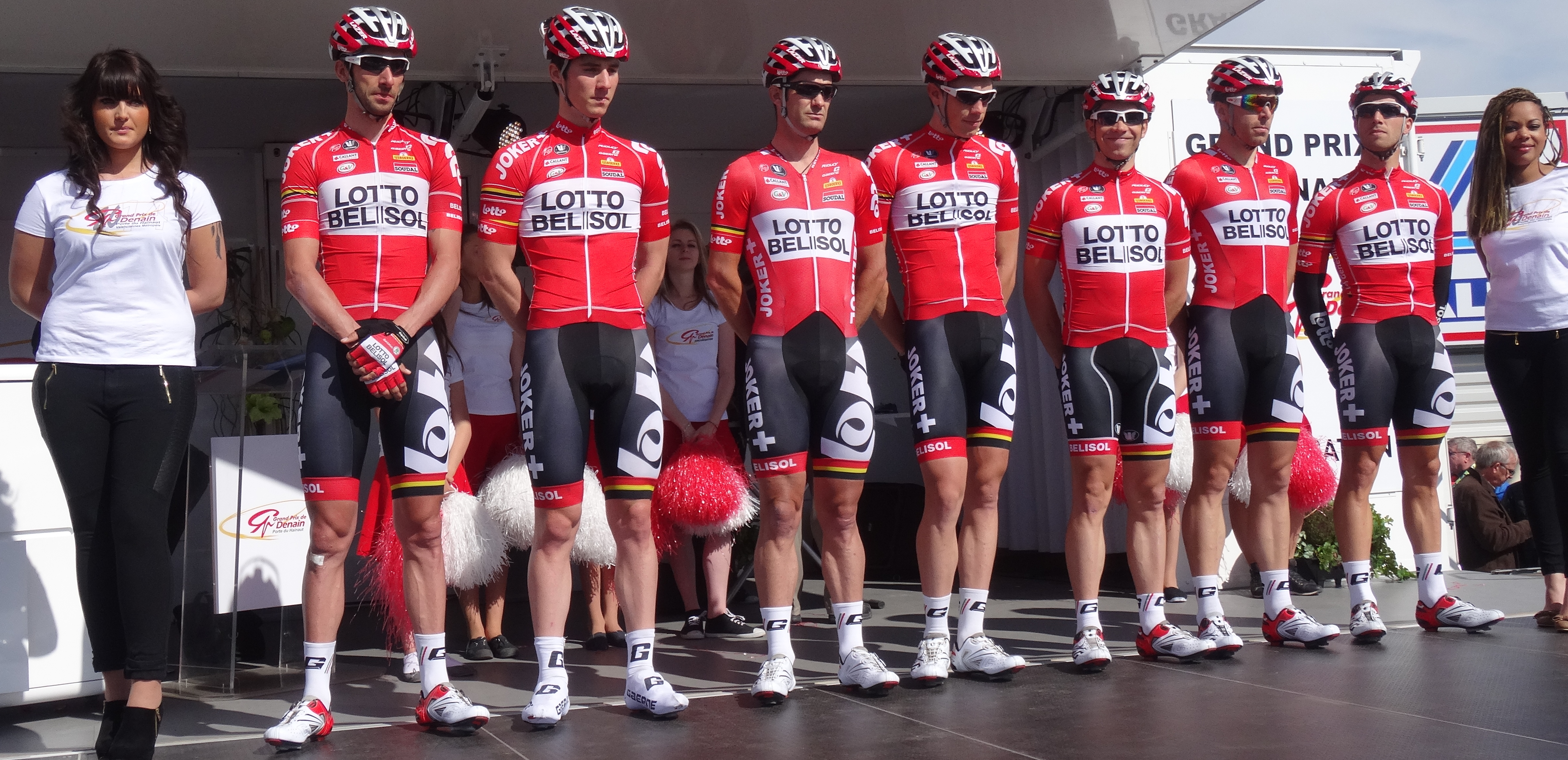 Reportage réalisé le jeudi 17 avril à l'occasion du départ et de l'arrivée du Grand Prix de Denain 2014 à Denain, Nord, Nord-Pas-de-Calais, France.